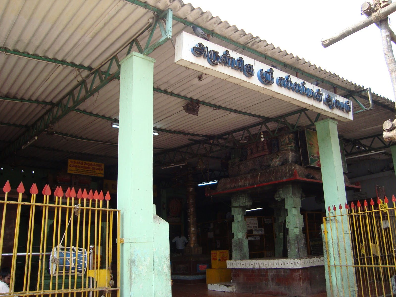 ஊத்துக்காடு எல்லம்மன் ஆலயம் முன்தோற்றம்